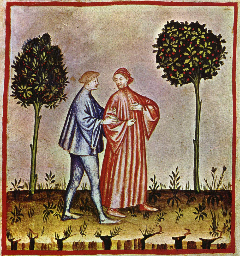 Tacuina sanitatis (XIV century) 1-svaghi, passeggiare,Taccuino Sanitatis, Casanatense 4182.